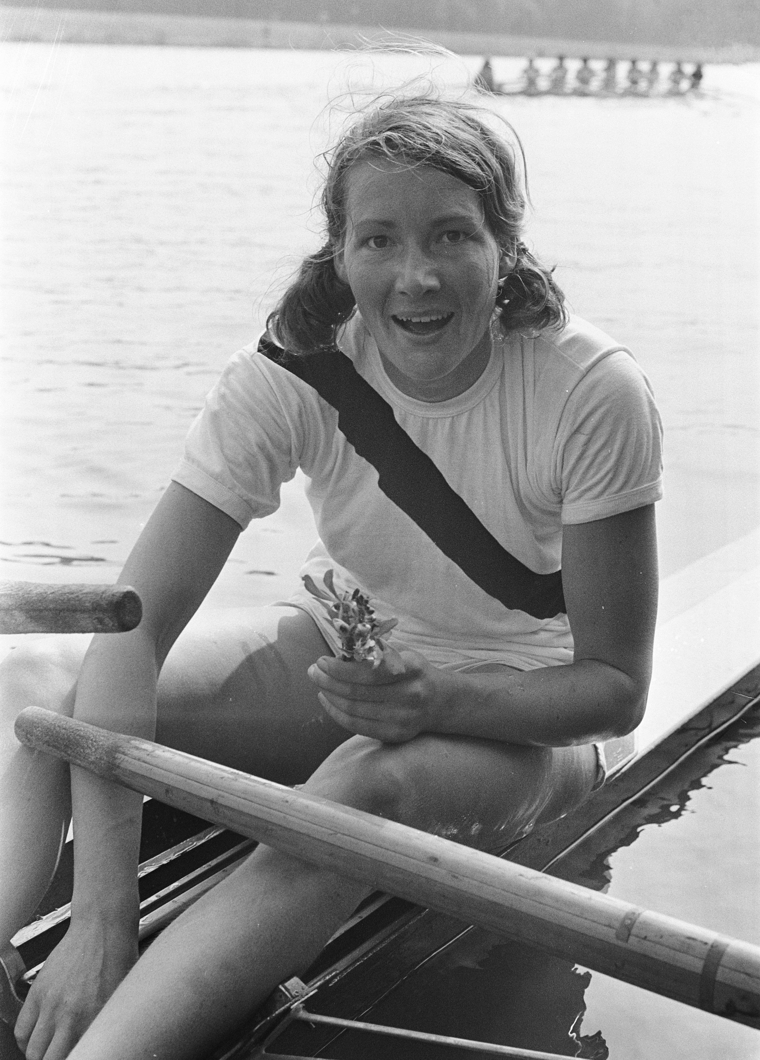 Gyas-skiffeuze Ingrid Dusseldorp